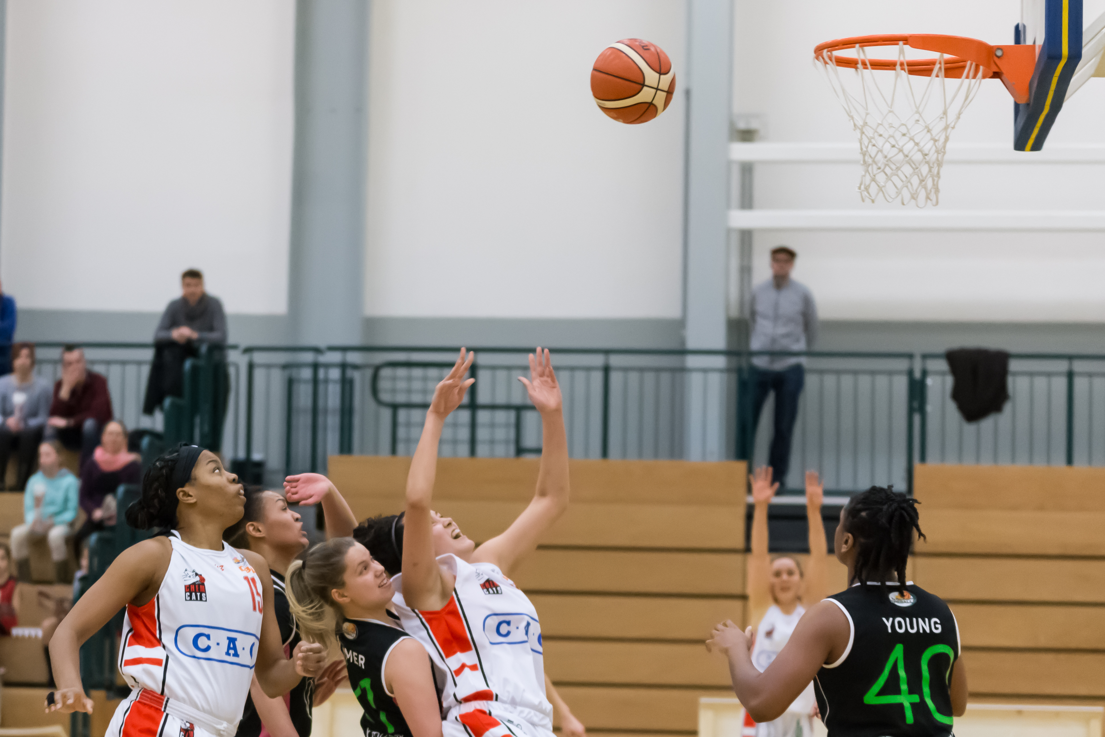 Basketball, 1. Damen-Basketball-Bundesliga, ChemCats Chemnitz - TuS Bad Aibling Fireballs; Kendall Marie Noble (ChemCats Chemnitz, 12) punktet